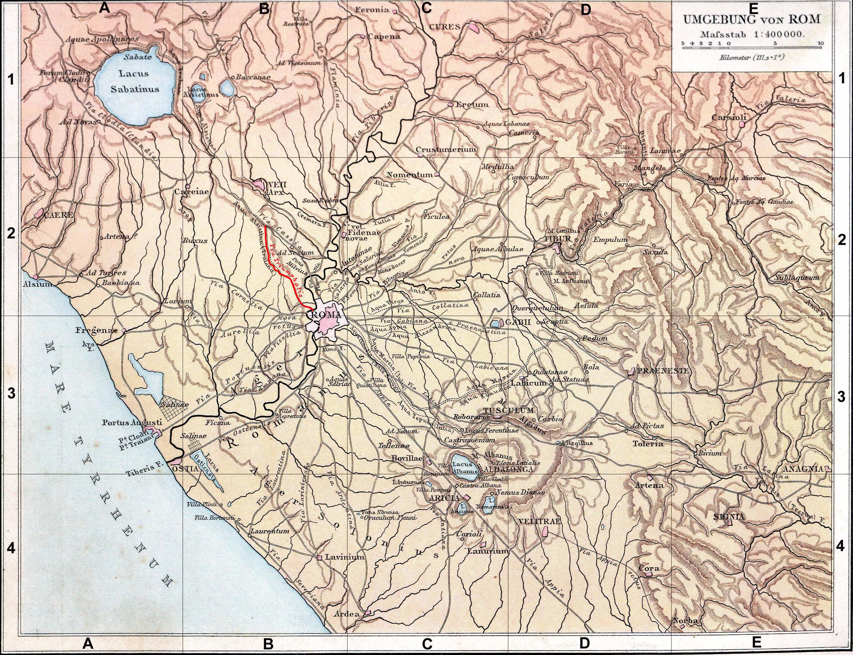 Fond de carte de 1886 (G. Droysens Allgemeiner Historischer Handatlas), libre de droit (Image:Rom_Umgebung.jpg), avec la voie triomphale en rouge.